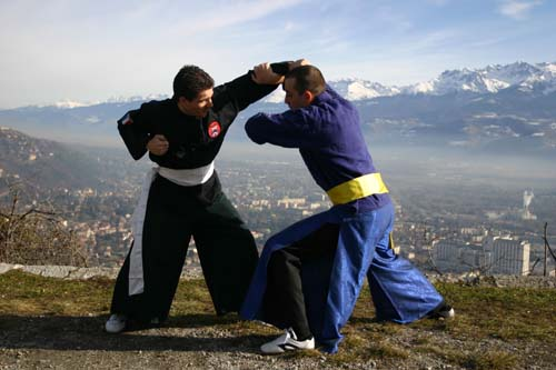 bando2005.jpg